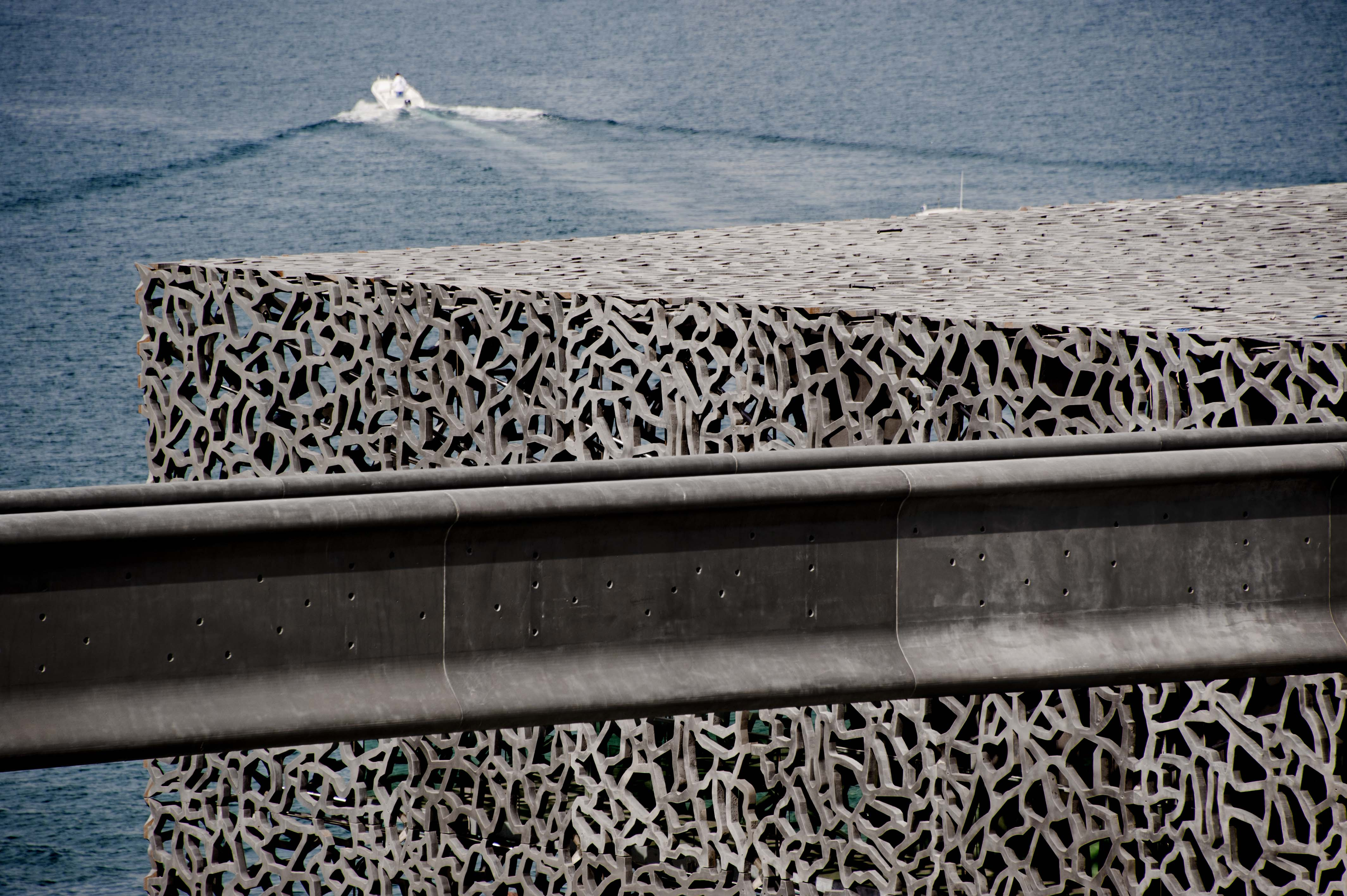 MARSEILLE_MuCEM